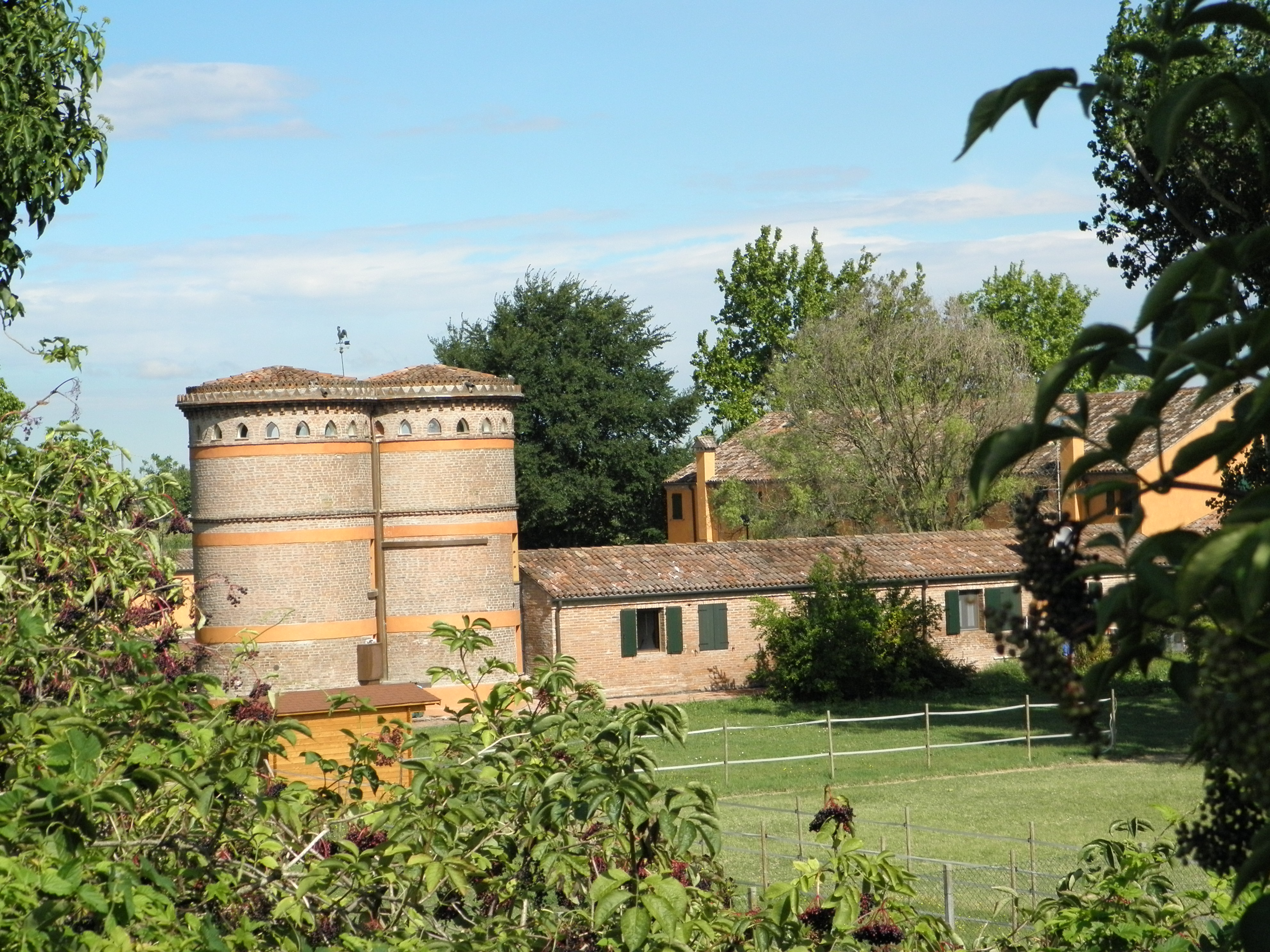 Rovigo: strutture del Residence Corte Moline.